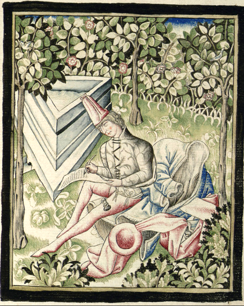 ChampionDesDames-Grenoble-Ms0352 : Martin Le Franc